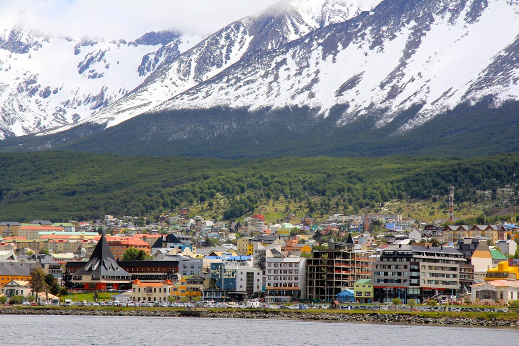 View of Ushuaia, Tierra del Fuego Province, Argentina.